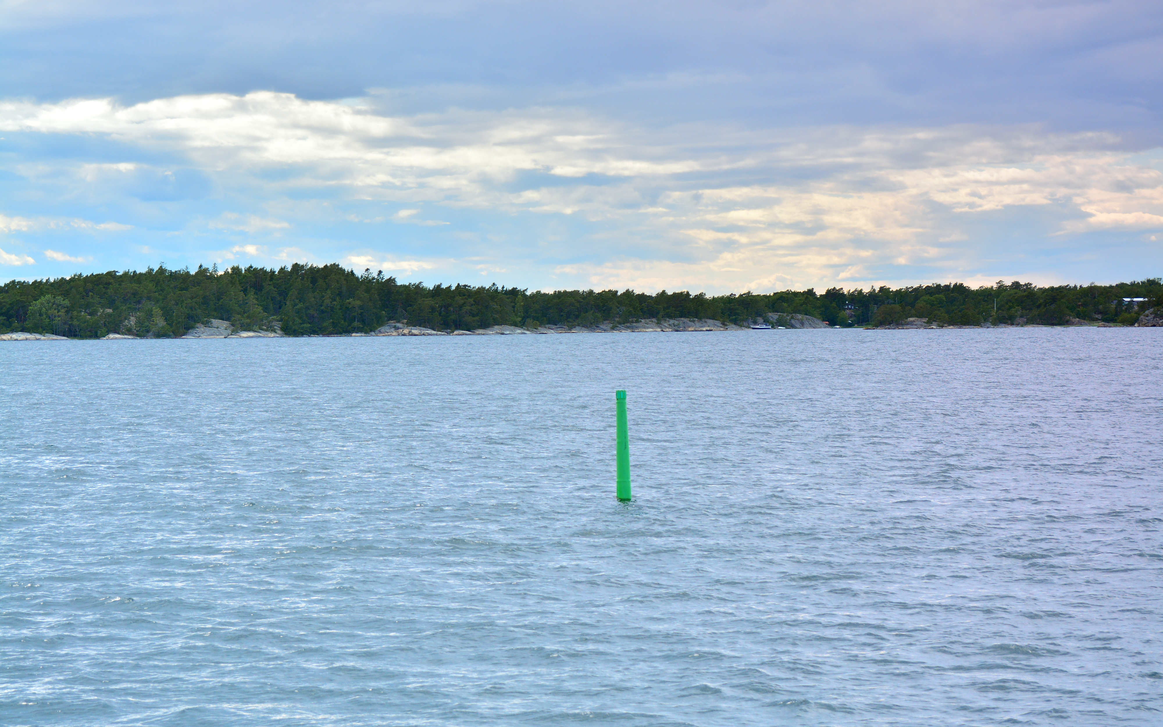 Möja söderfjärd med Korsö i bakgrunden.